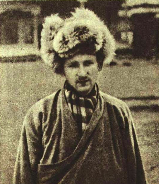 1951 昌都战役结束后被解放军俘虏的英国人福特